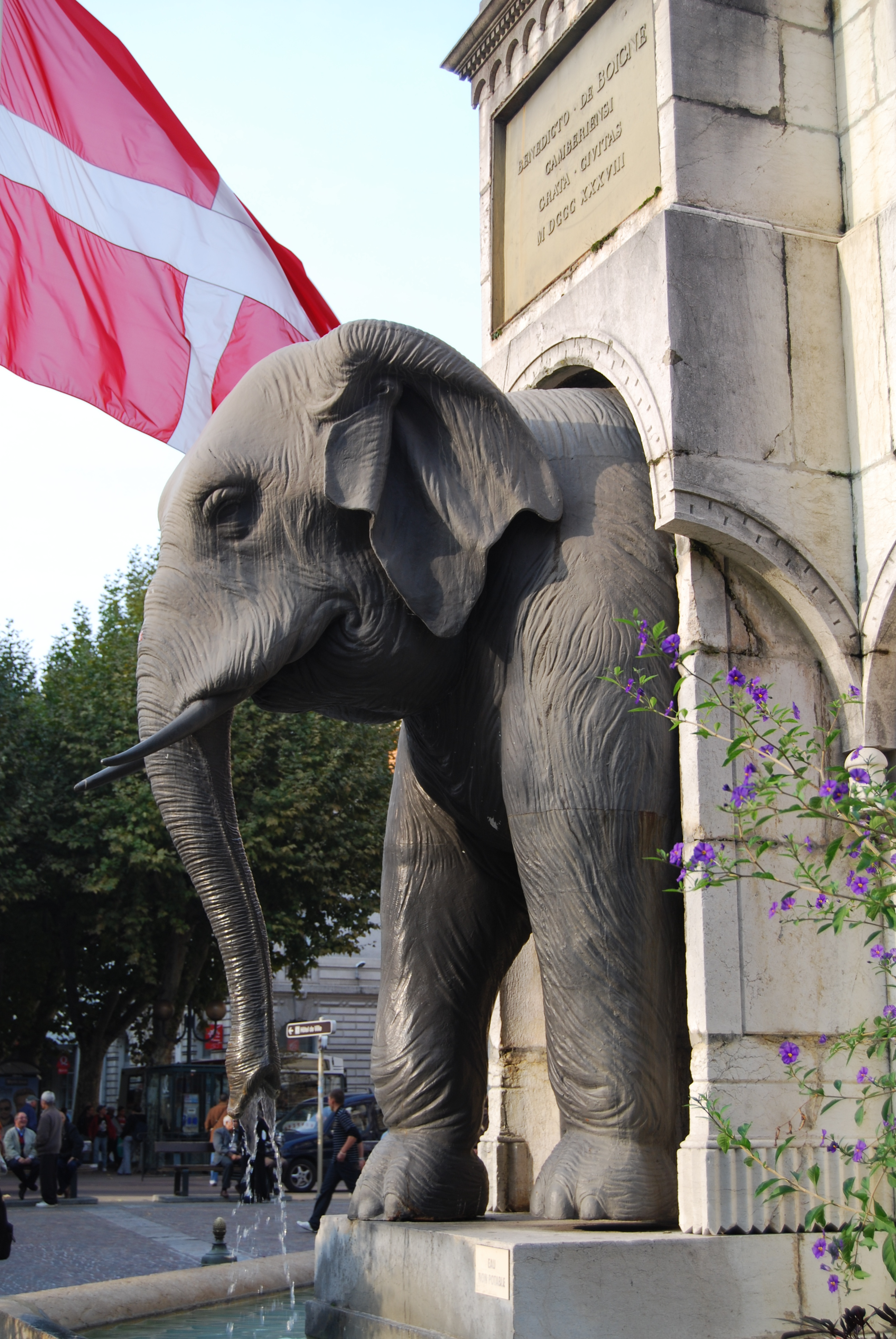 Cette fontaine est le monument le plus célèbre de Chambéry, il a été érigée en 1838 par le sculpteur grenoblois Pierre-Victor Sappey qui commémore les exploits en Inde du Général et Comte de Boigne (1751-1830). Détail de l'un des quatre éléphants de bronze.